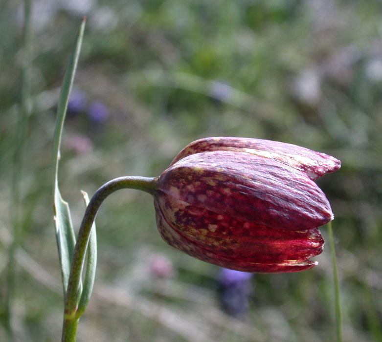 Fritillaria orientalis